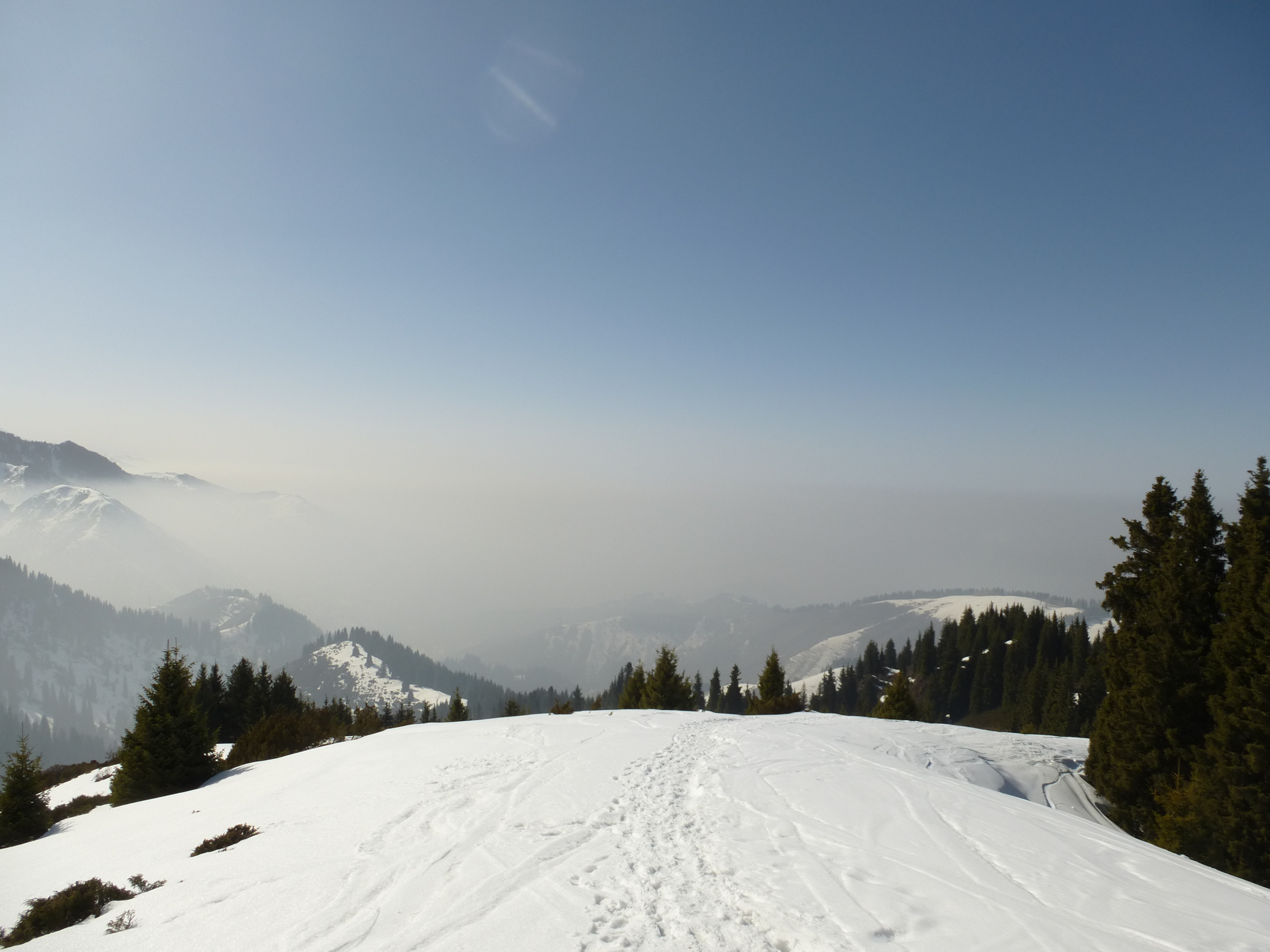 Верхняя граница смога над Алматы. Ракурс с тропы к пику Фурманова. Окрестности Медео. Ориентировочная высота верхней границы смога - 2200-2400 метров над уровнем моря.